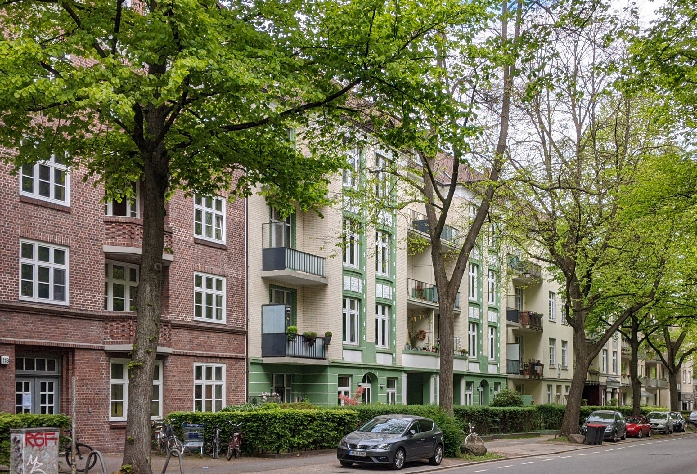 Wohnhäuser im Hammer Steindamm in Hamburg-Hamm